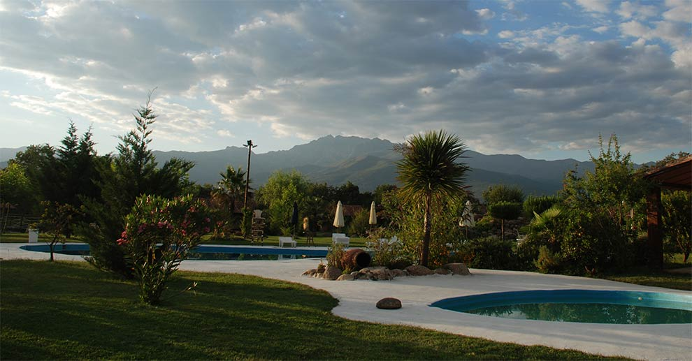 Pueblo Inglés de Diverbo en Candeleda (Ávila).